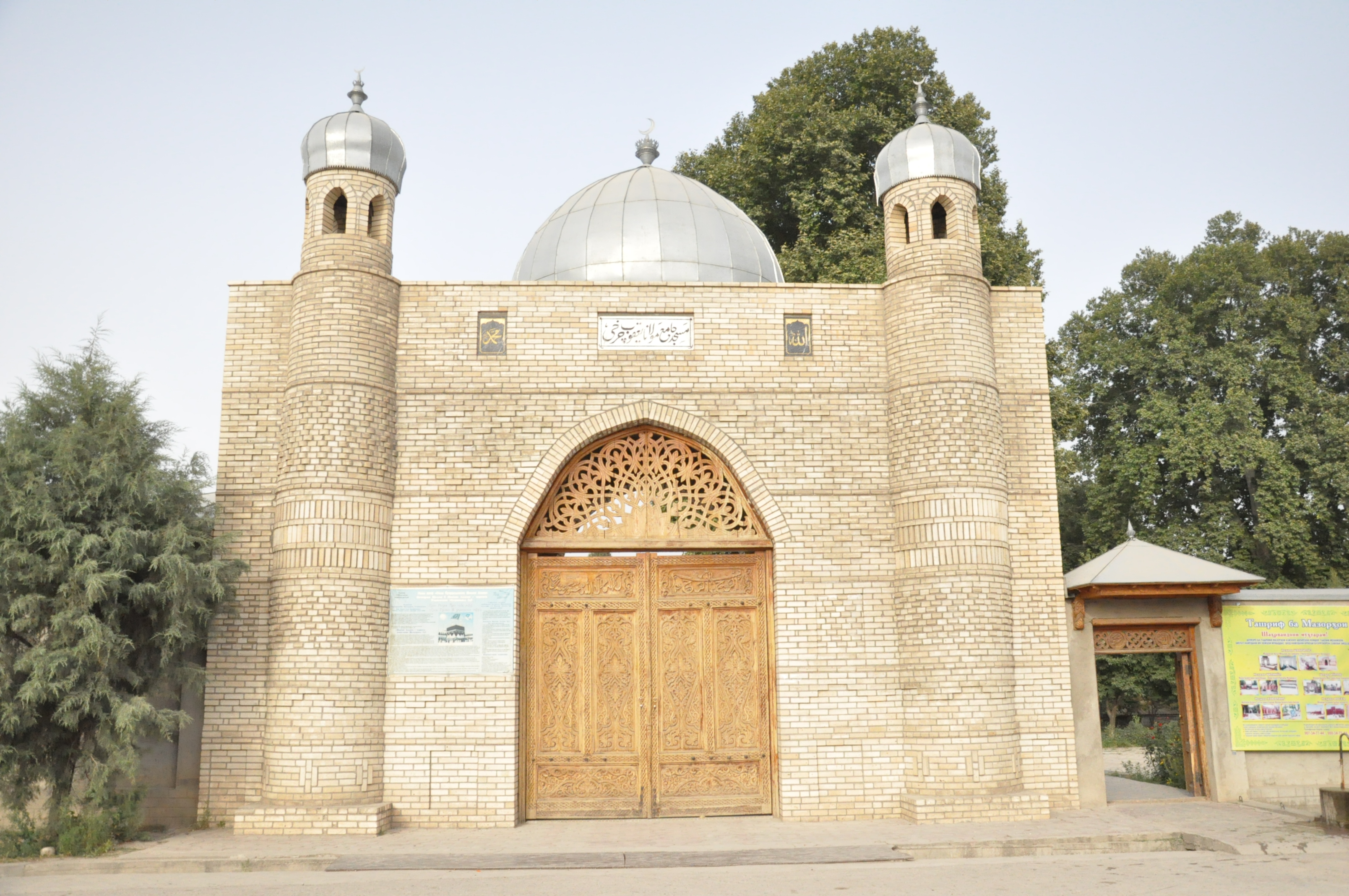 Тоҷикӣ: Масҷиди ҷомеи марказии н. Рӯдакӣ ба номи Мавлоно Яъқуби Чархӣ (1)